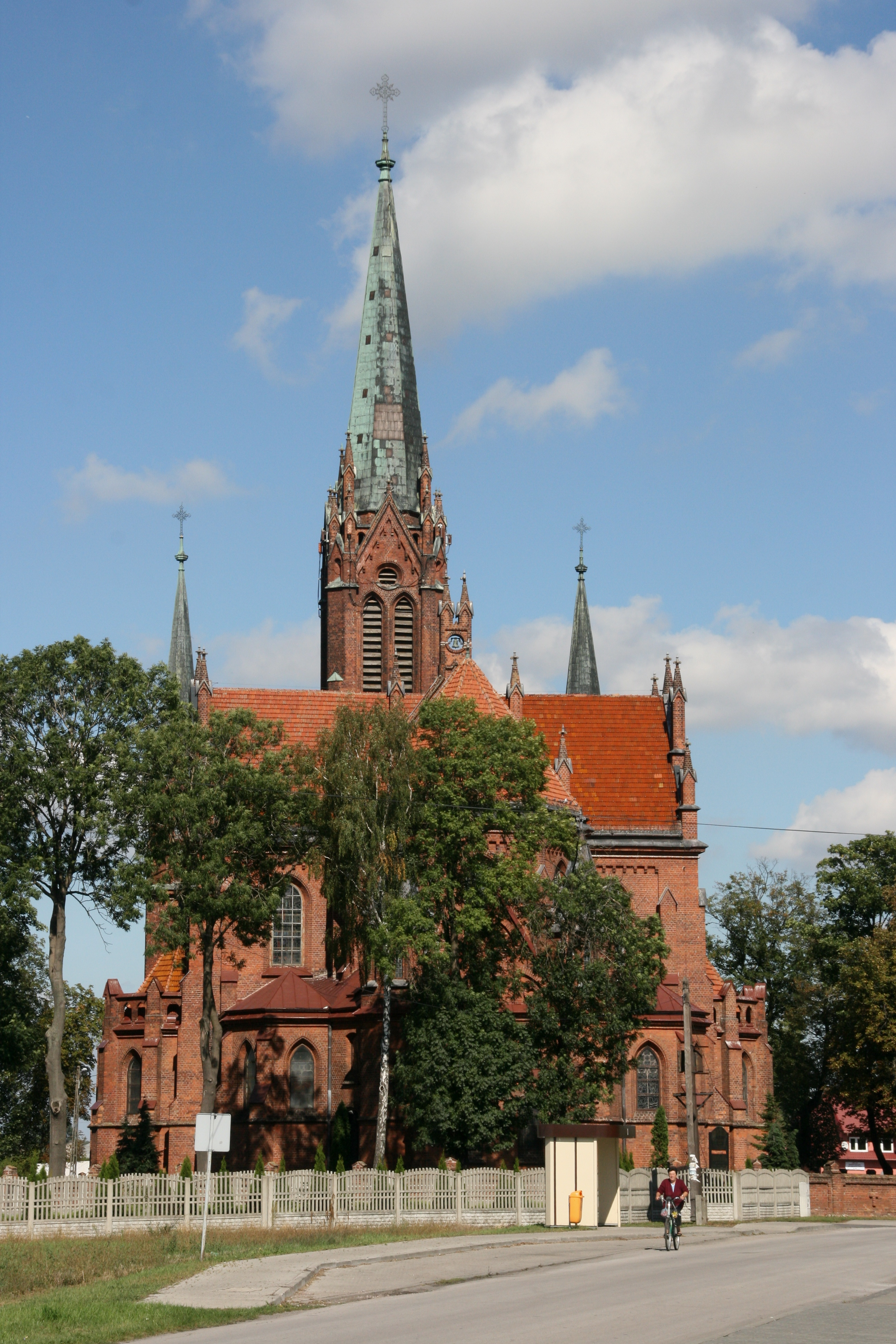 Zduny 26 - kościół parafialny pw. św. Jakuba Apostoła, widok od południa (zabytek nr rejestr. 511-A)